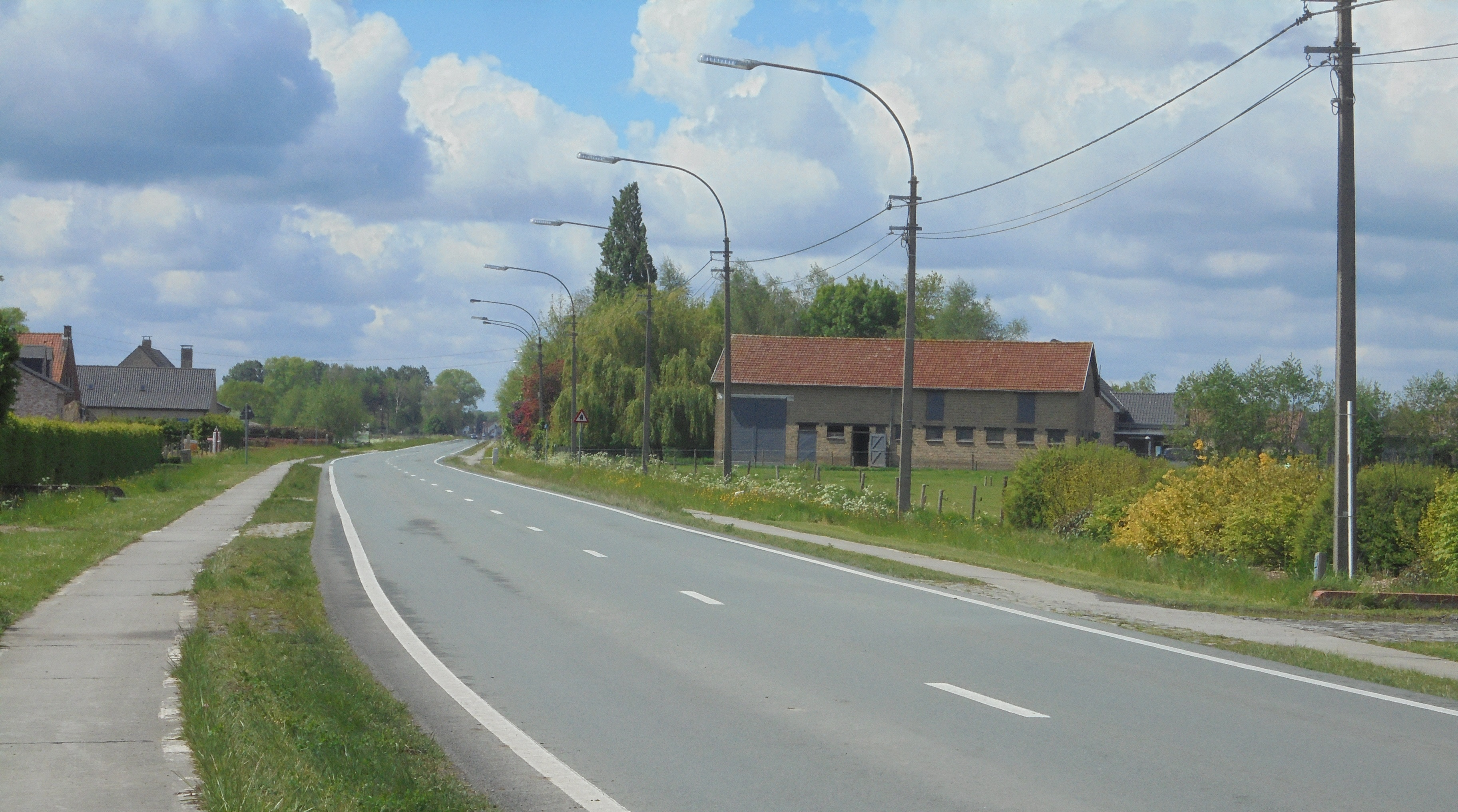 De Middelweg (N499) in Ursel - richting Aalter-Brug - Aalter - Oost-Vlaanderen - België.